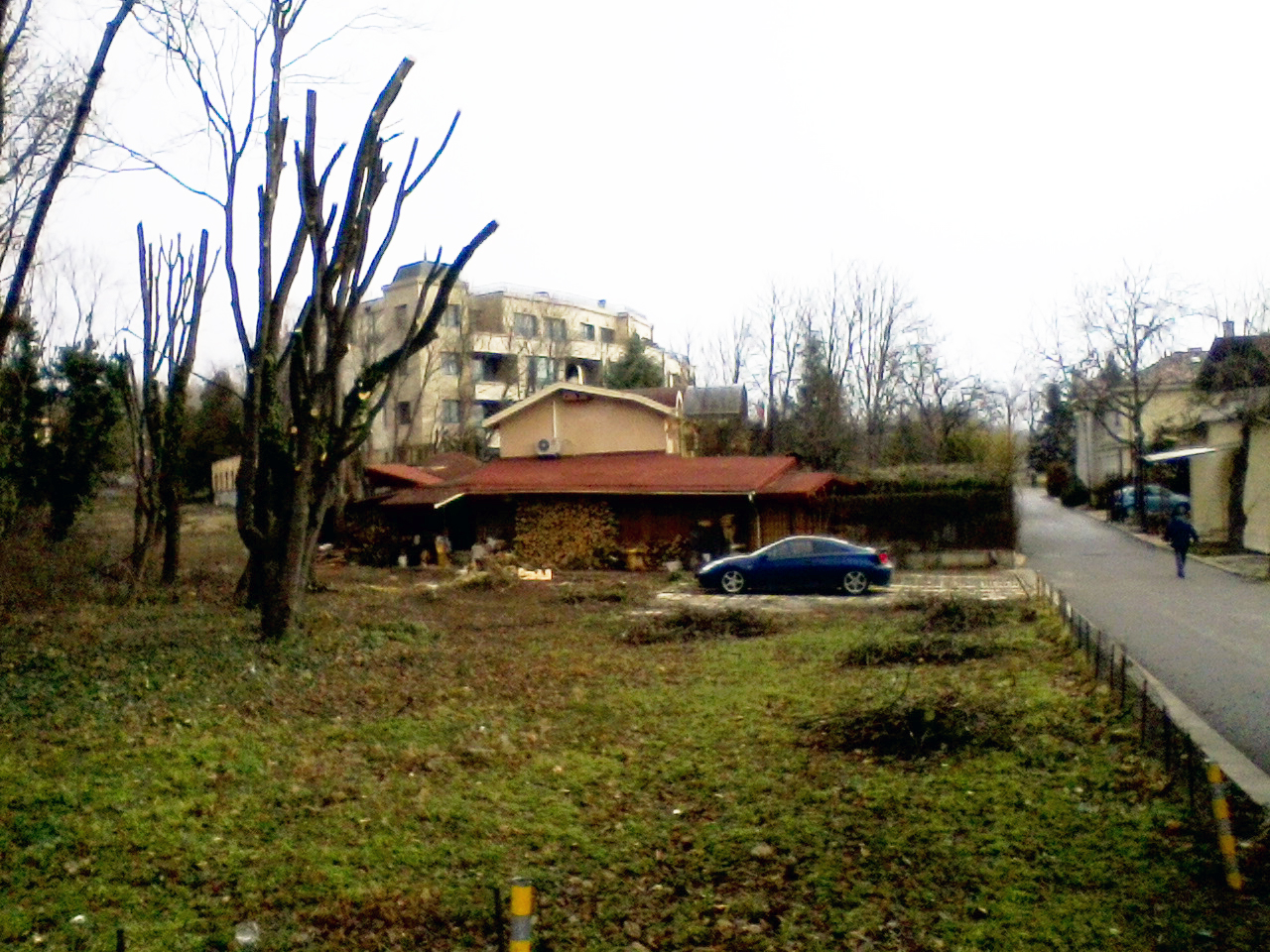 Морската градина на Варна